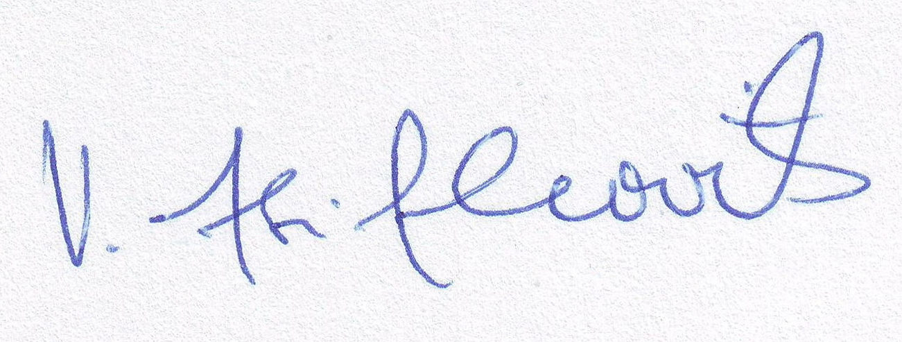 Unterschrift Valentin Zsifkovits, Juni 1998, Ausschnitt